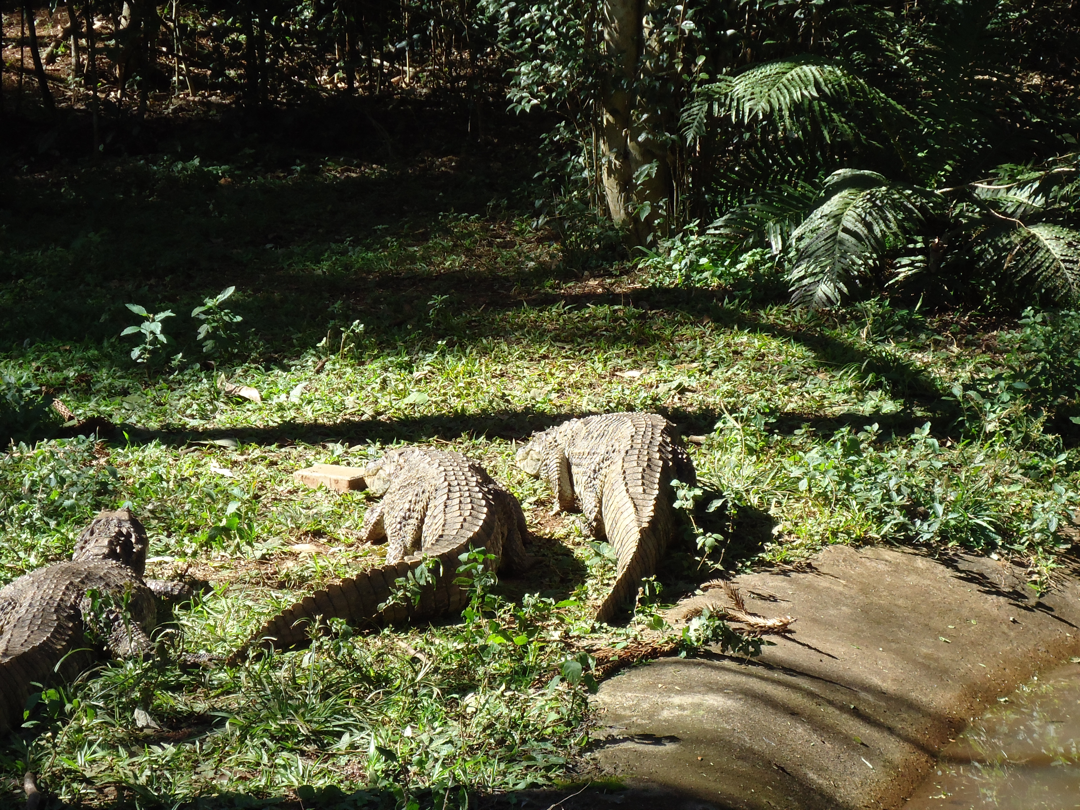 Imagens de julho de 2013